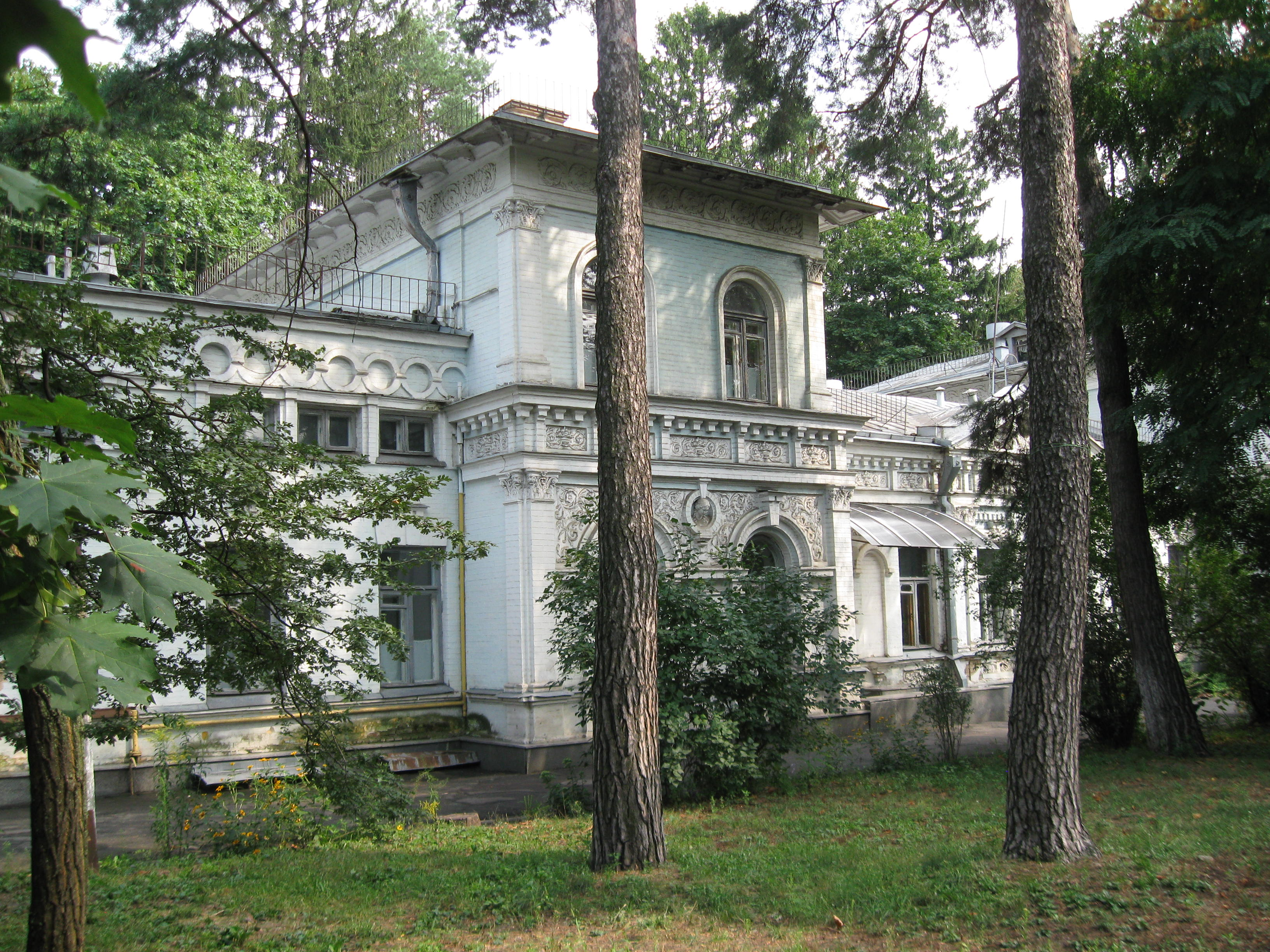 Колишня дача Хрущова в Києві, вул. Герцена, 12